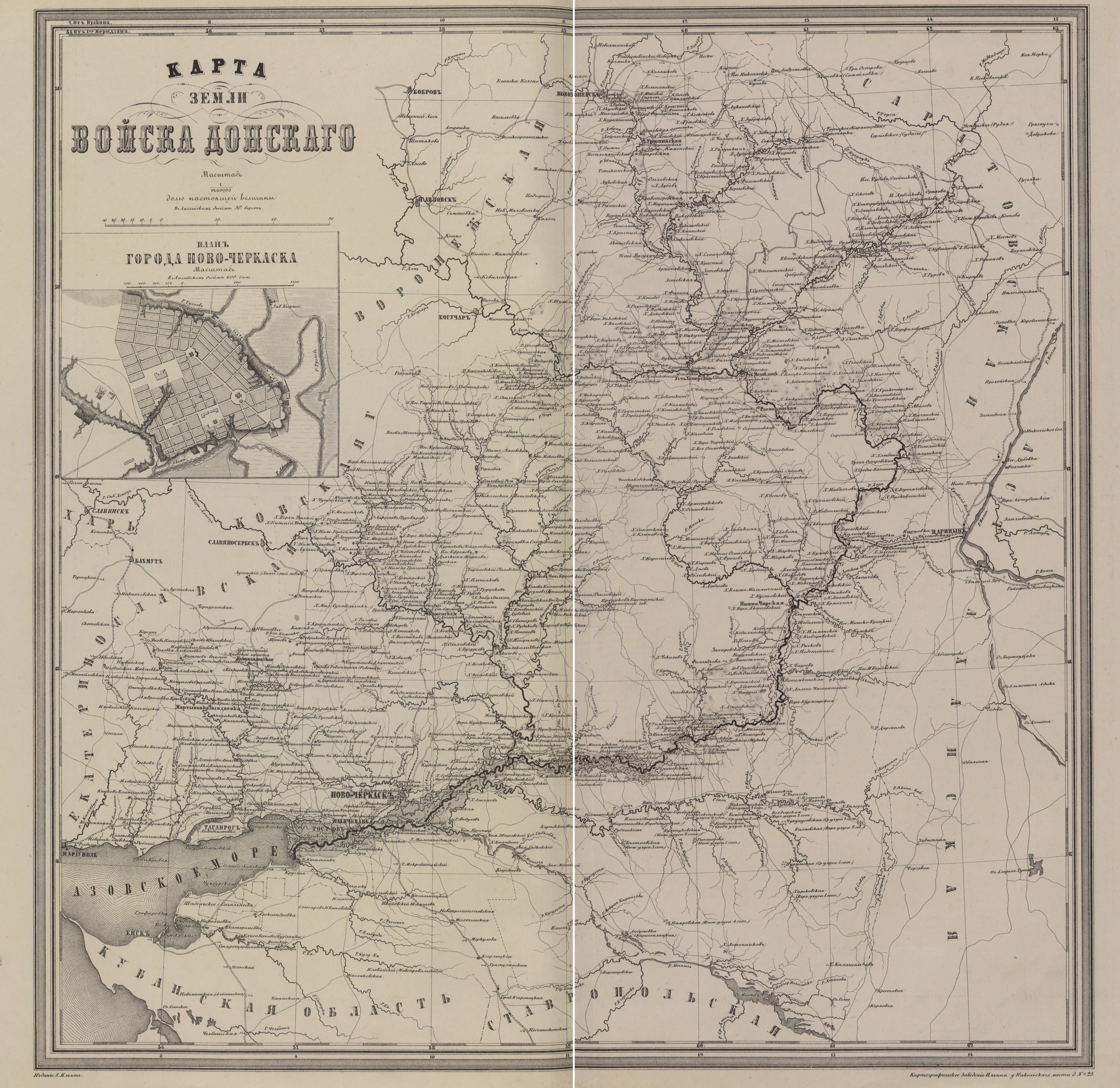 Карта Войска Донского из атласа Российской империи 1871 года под редакцией генерала Ильина